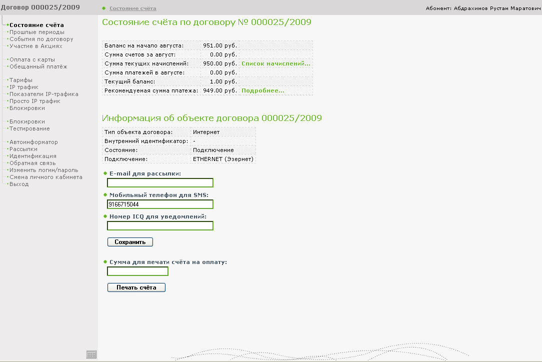 АСР Fastcom. ЛК Абонента. Состояние счёта